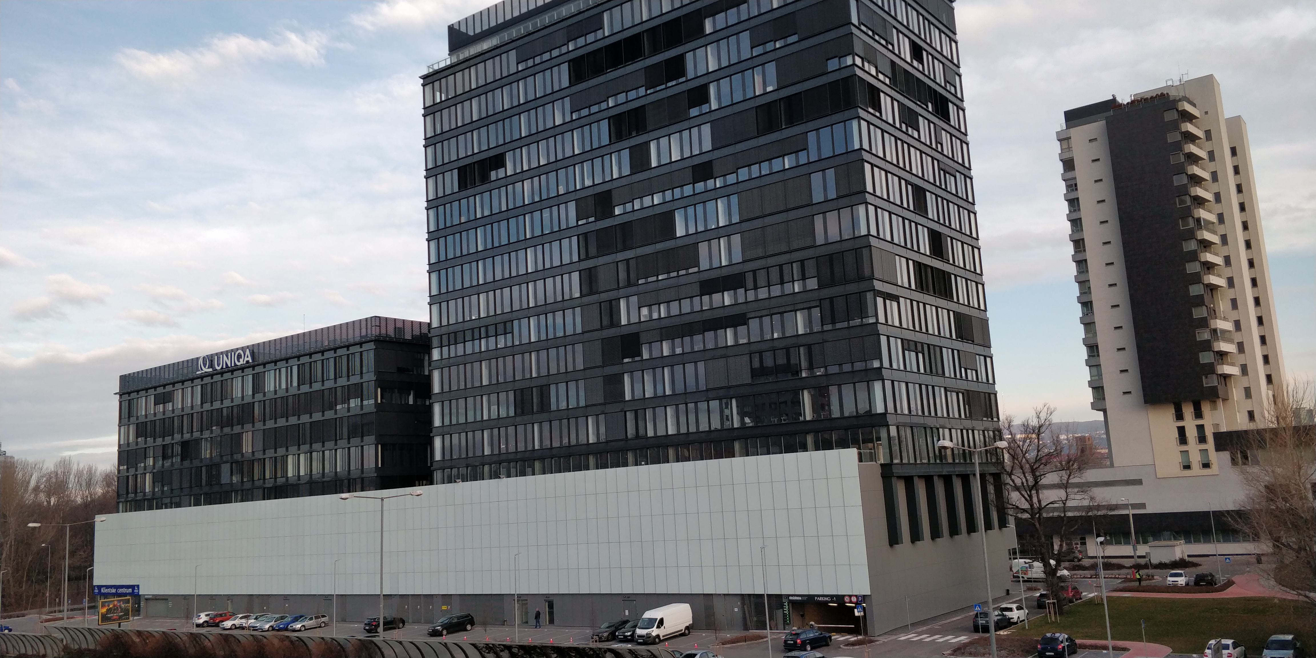 Einsteinova Business Center, Krasovského 14, Bratislava